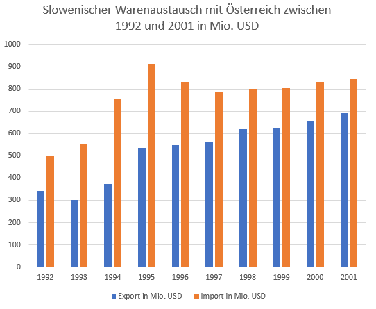 Gegenüberstellung slowenischer Export und Import 1992-2001. Daten aus: Mitja Ferenc, Bozo Repe: Die slowenisch-österreichischen Beziehungen nach der internationalen Anerkennung. S.670.